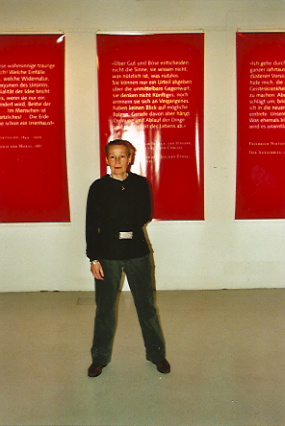 Portrait der Künstlerin Karin Sakrowski